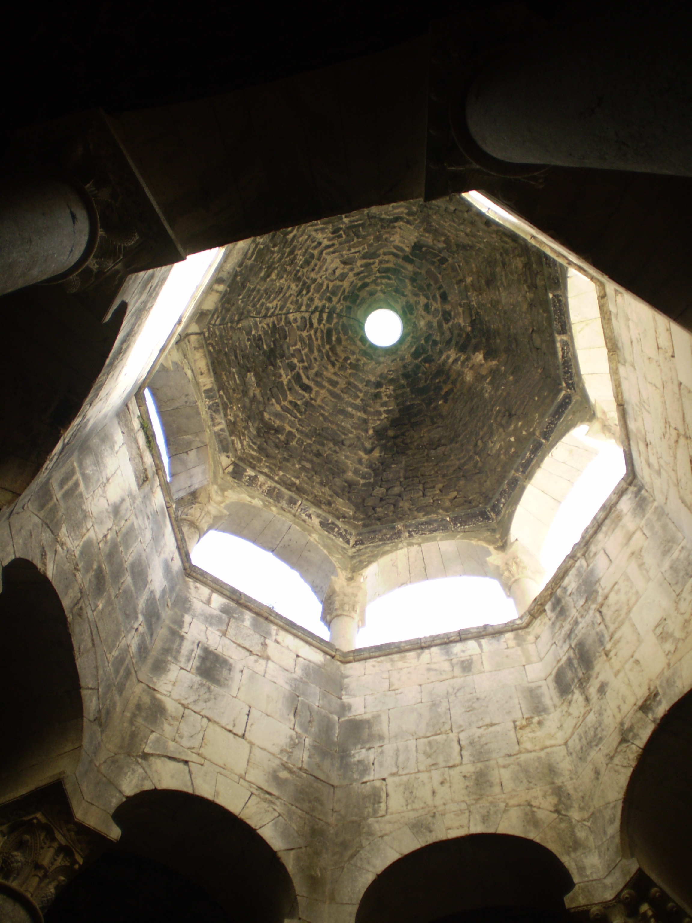 Cúpula dels Banys Àrabs, Girona, Catalunya.